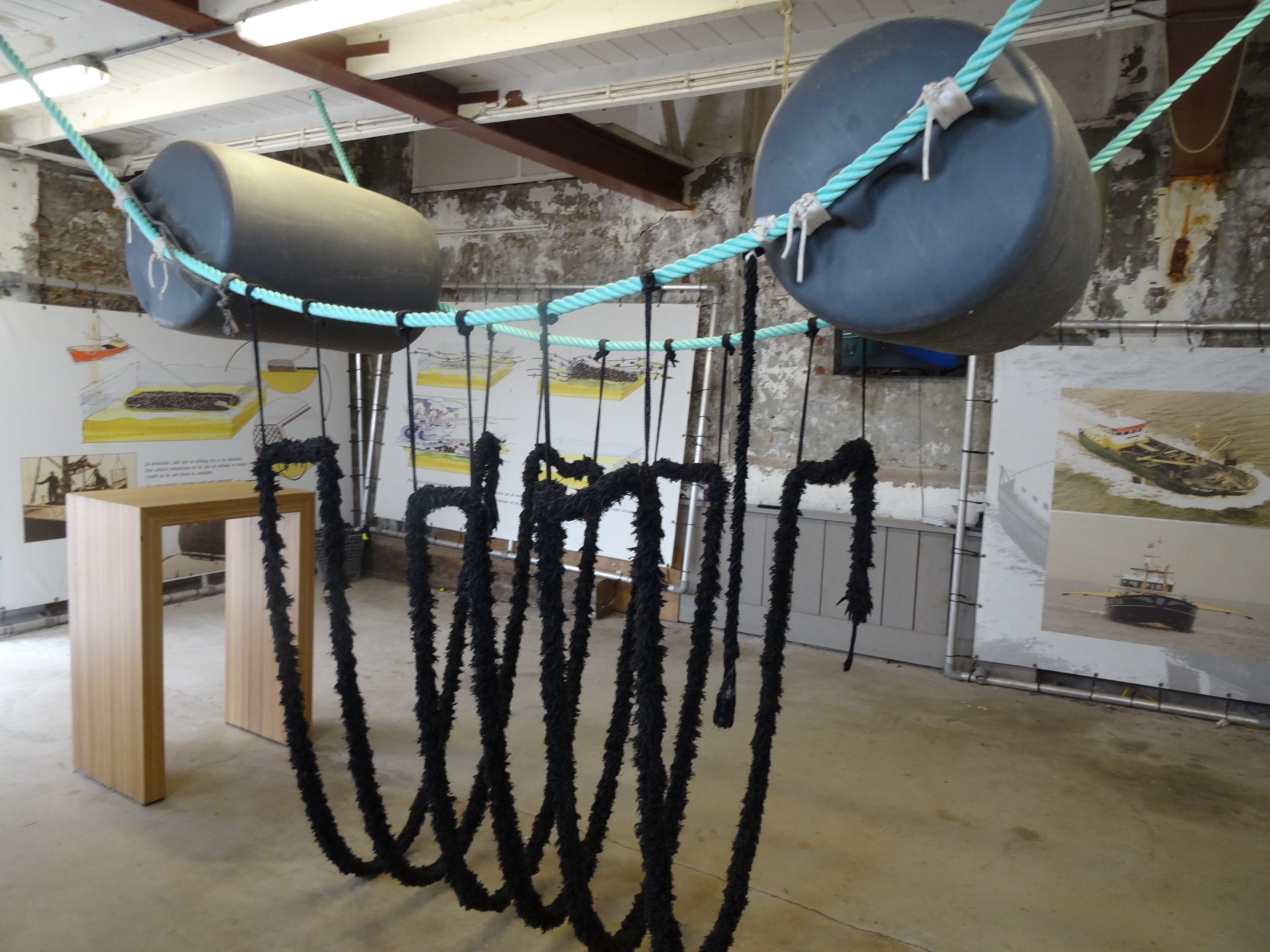 Hangcultuur mosselen